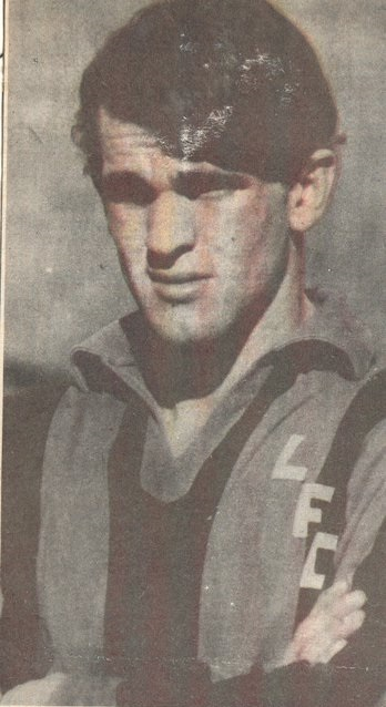 Pierino Lattuada en 1968